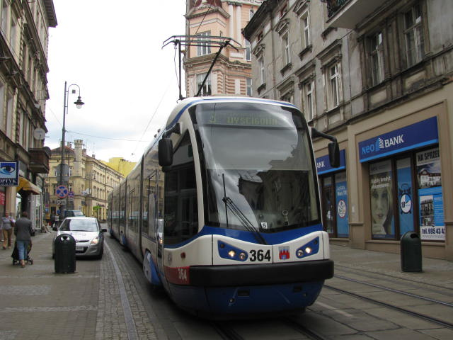 MZK Bydgoszcz ul. Gdańska